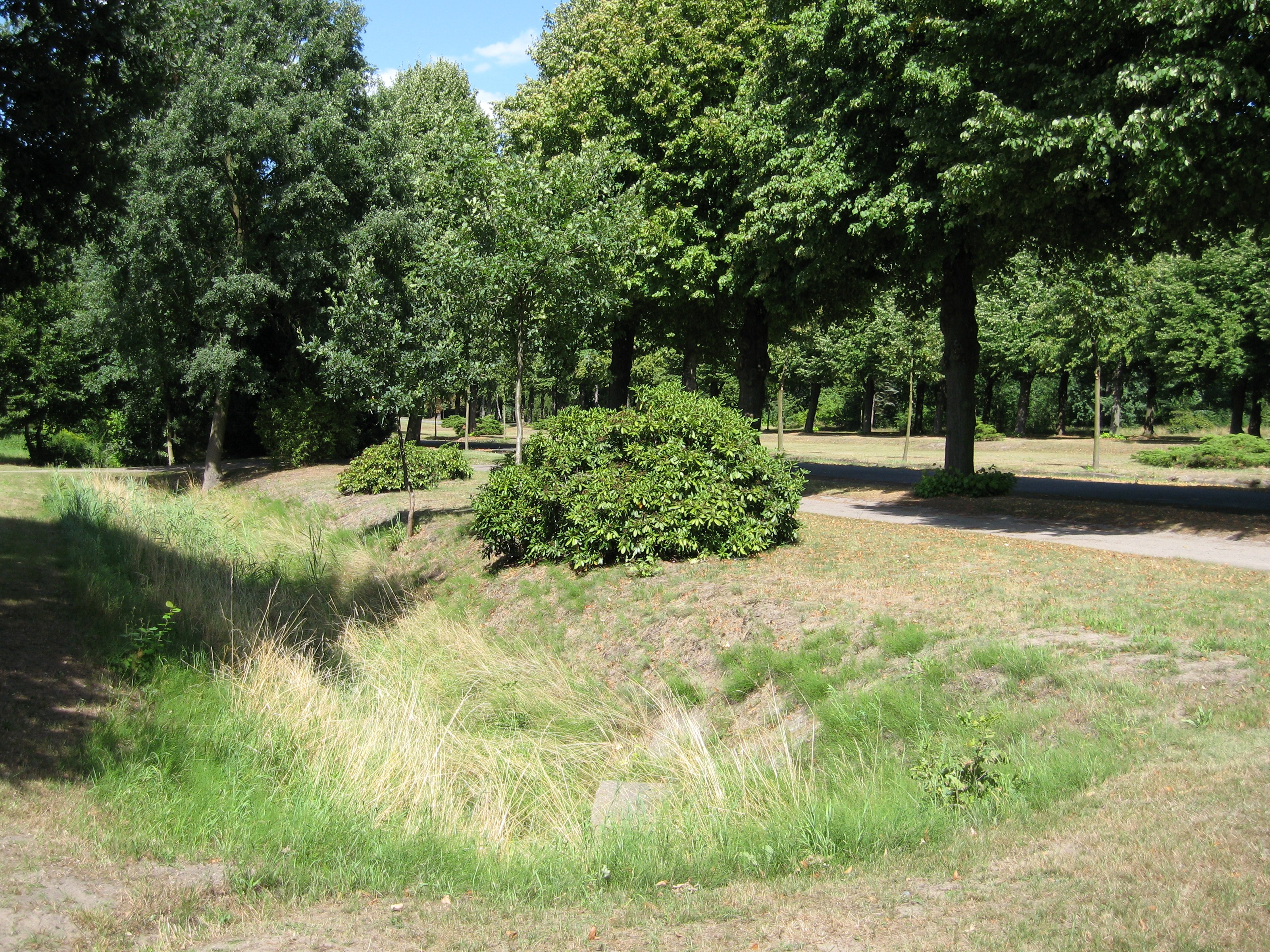 Der Wuhlegraben auf dem Ostkirchhof Ahrensfelde, Landkreis Barnim, Land Brandenburg, Deutschland